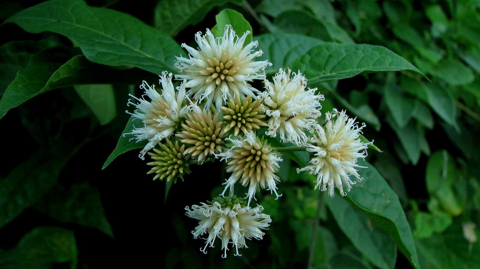 Albertinia brasiliensis Spreng.